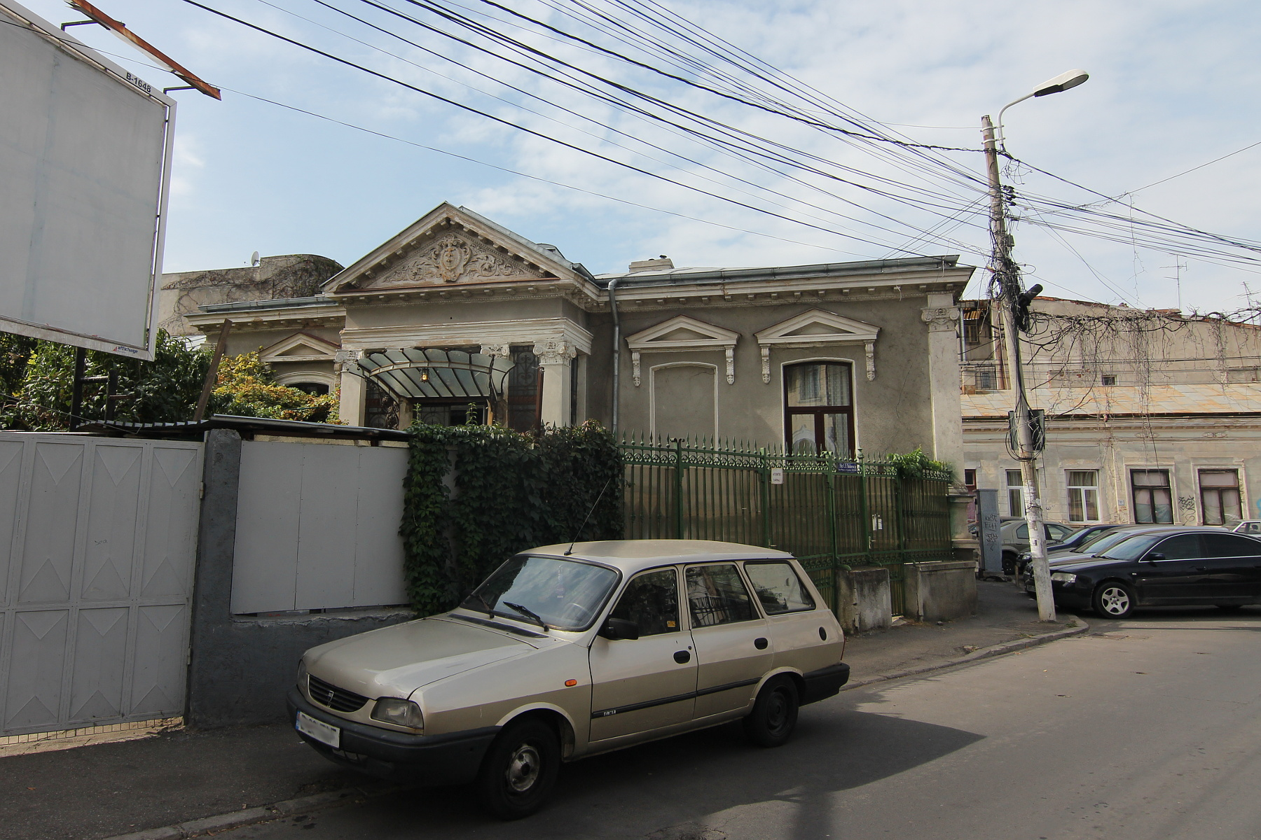 Casă pe Str Robescu